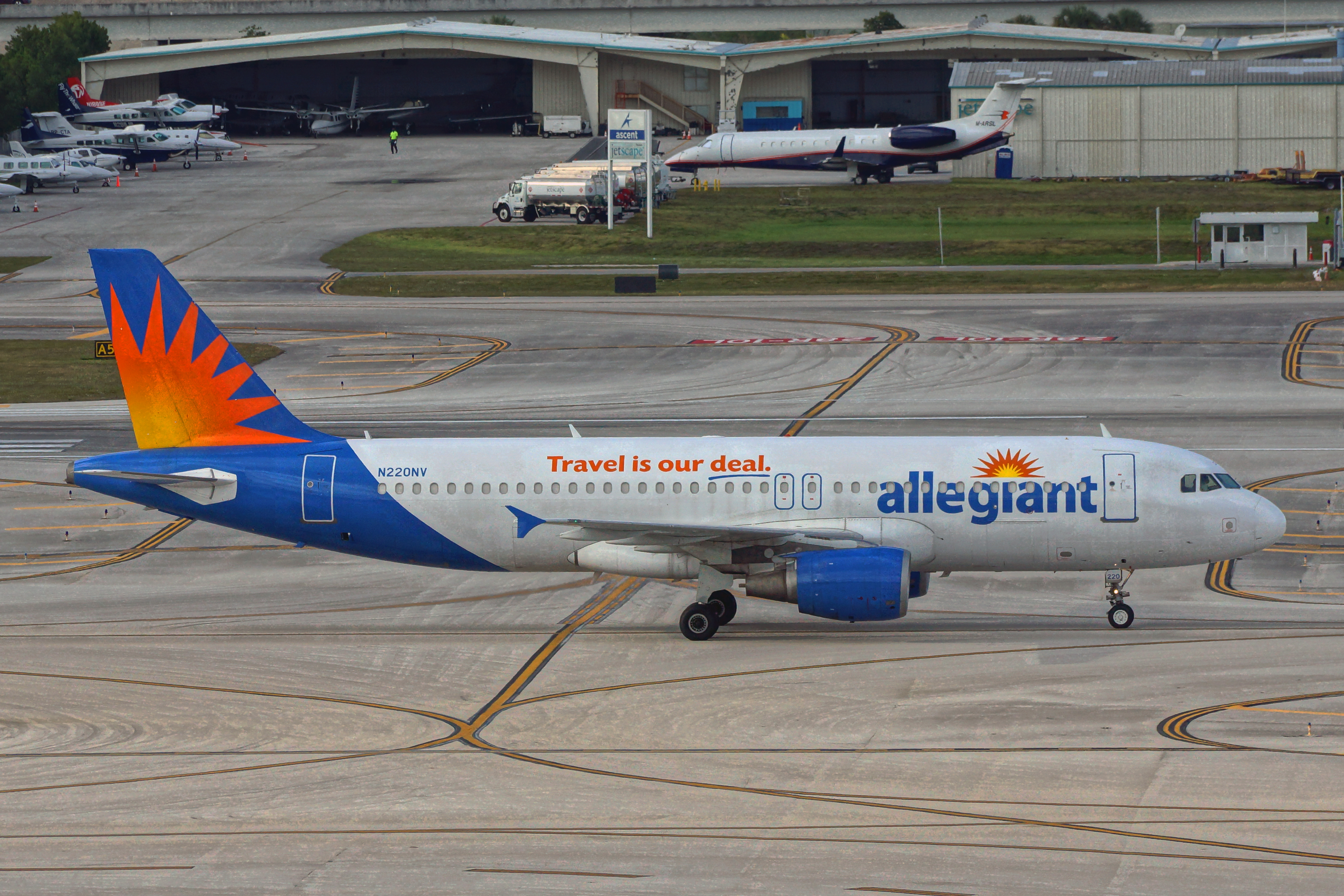 Allegiant N220NV FLL 8x12 JTPI 496